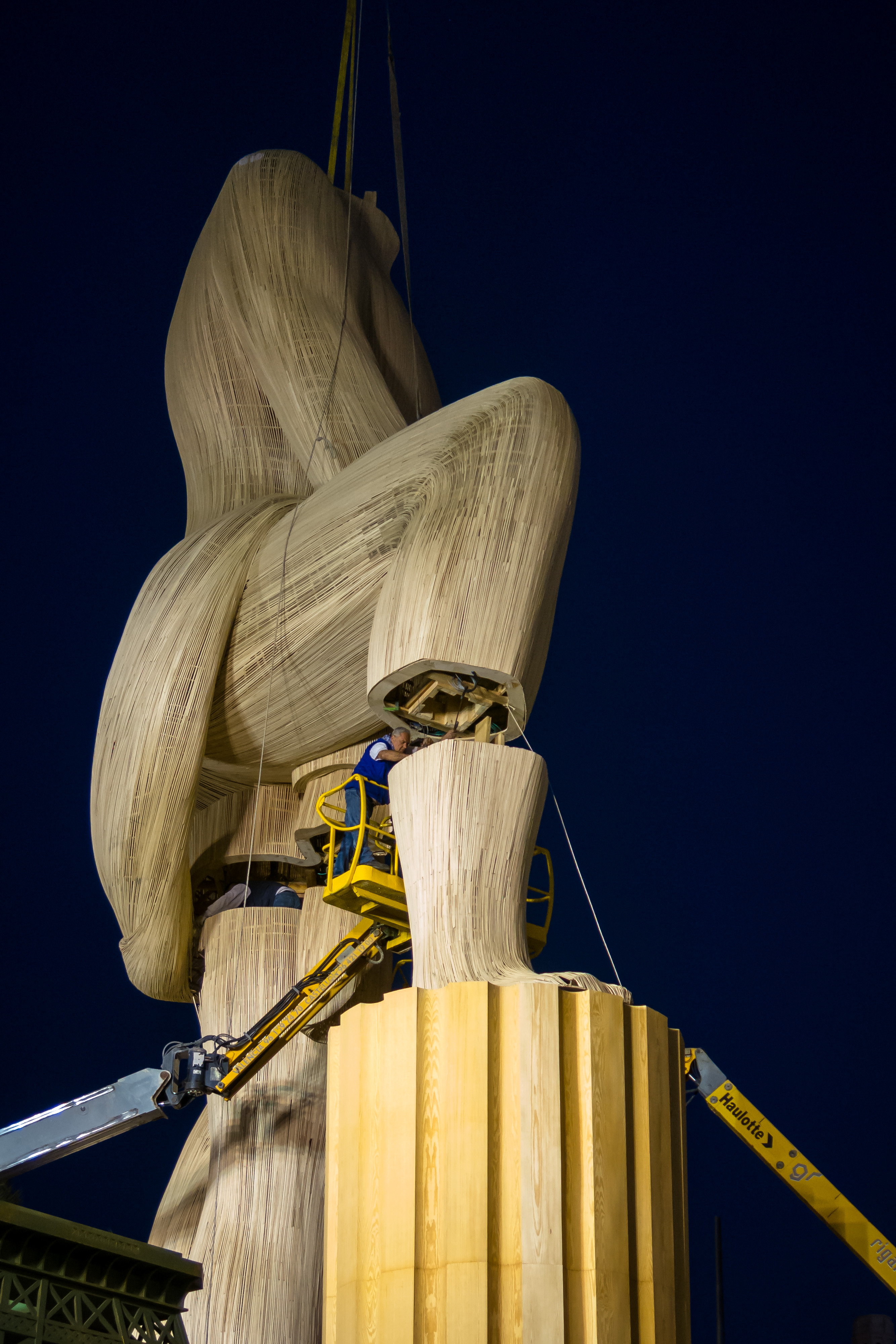 Los días previos a la "plantà", los artistas falleros montan y dan los últimos retoques a los monumentos en las calles. This is a photography of a Folklore festival in Spain (Wikidata id Q1143768).